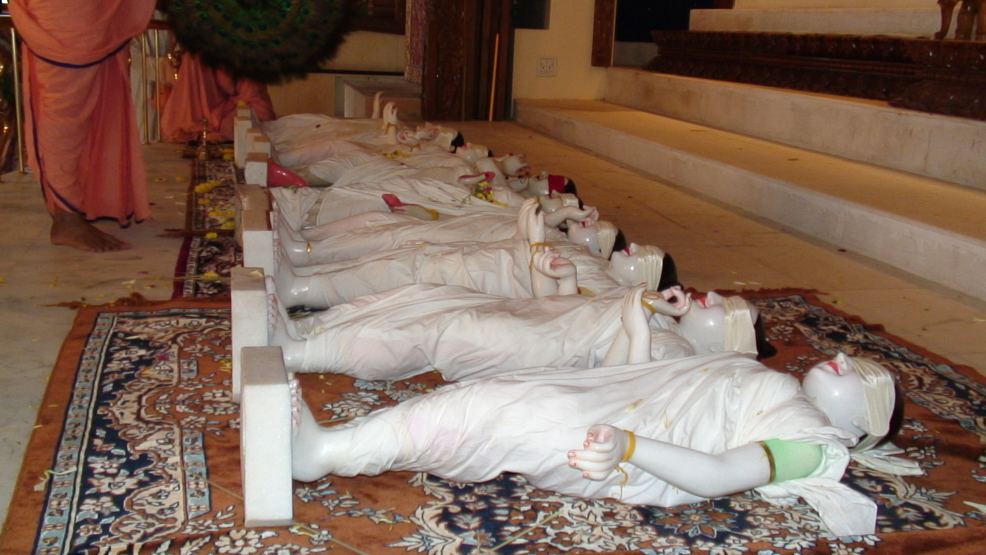 Radha Krishna ashta sakhis before installation in Tirupati